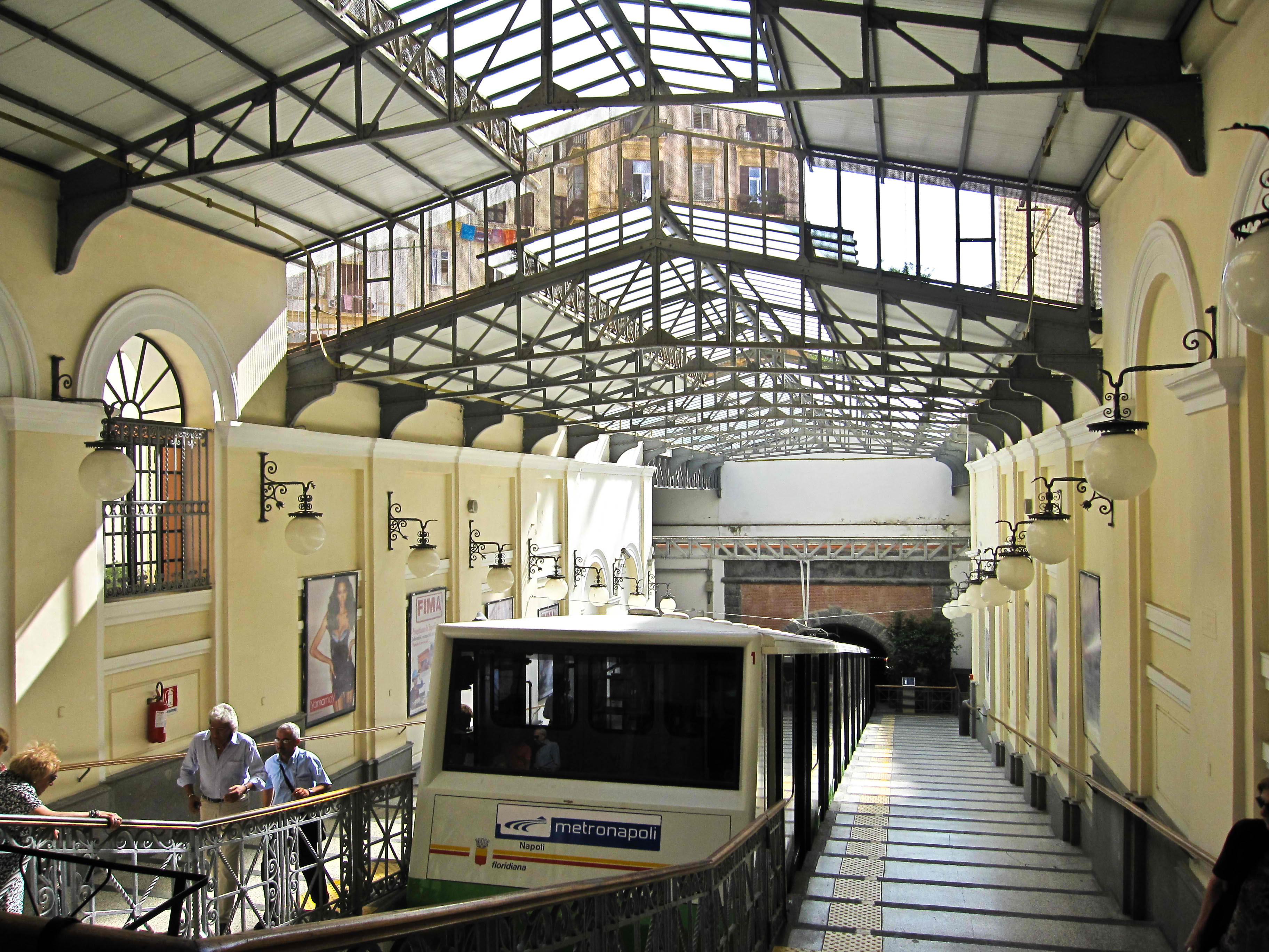 La stazione a monte - Vomero Piazza Fuga - Interno banchine. Napoli - Italia.